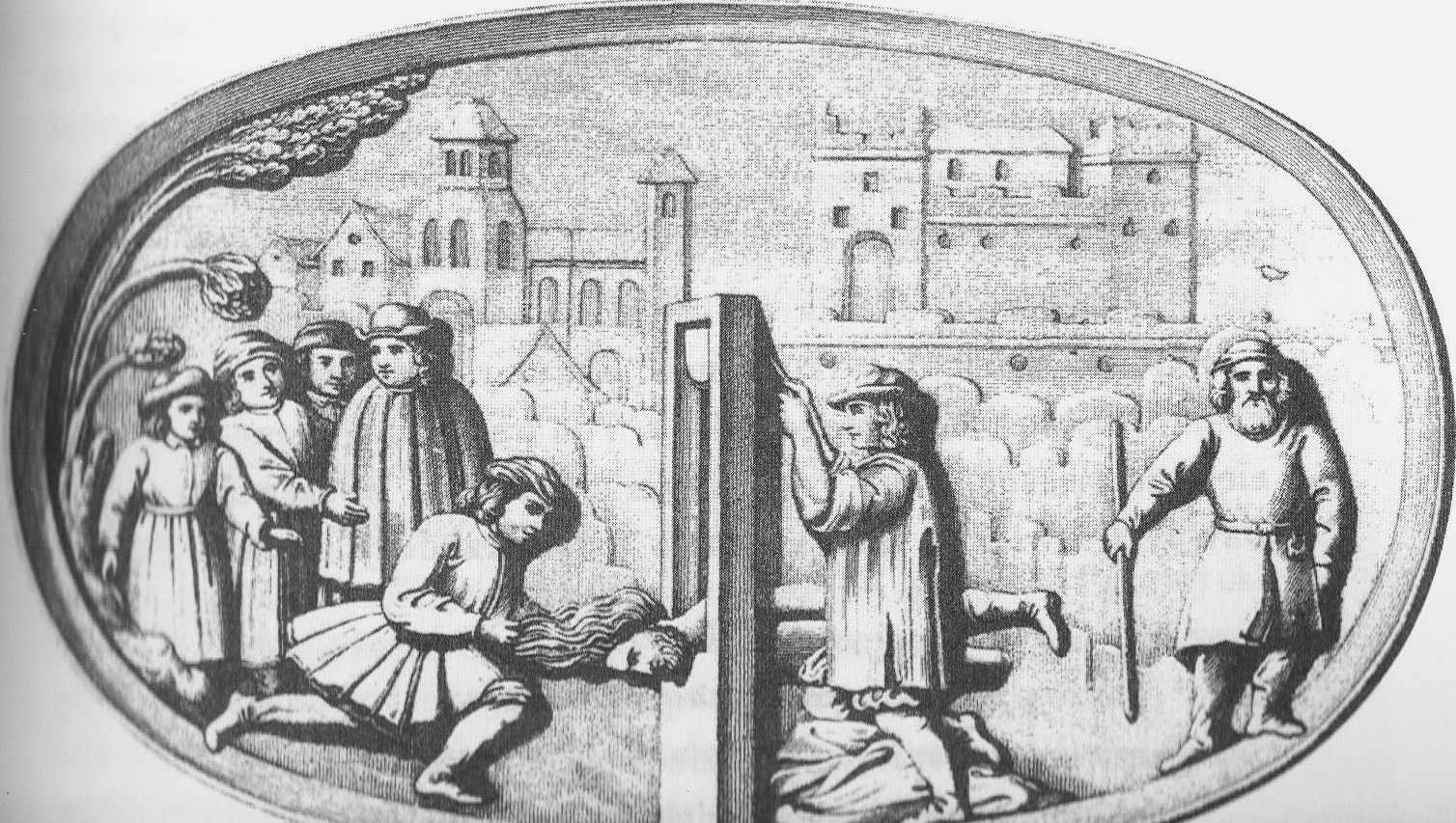 Według Edwarda Raczyńskiego to właśnie Polska miała być krajem, w którym po raz pierwszy wynaleziono i zastosowano gilotynę. Dowodem na to miała być płaskorzeźba na jednej z ław kościoła św. Józefa w Kaliszu, pochodząca z XVI, a być może XV wieku.